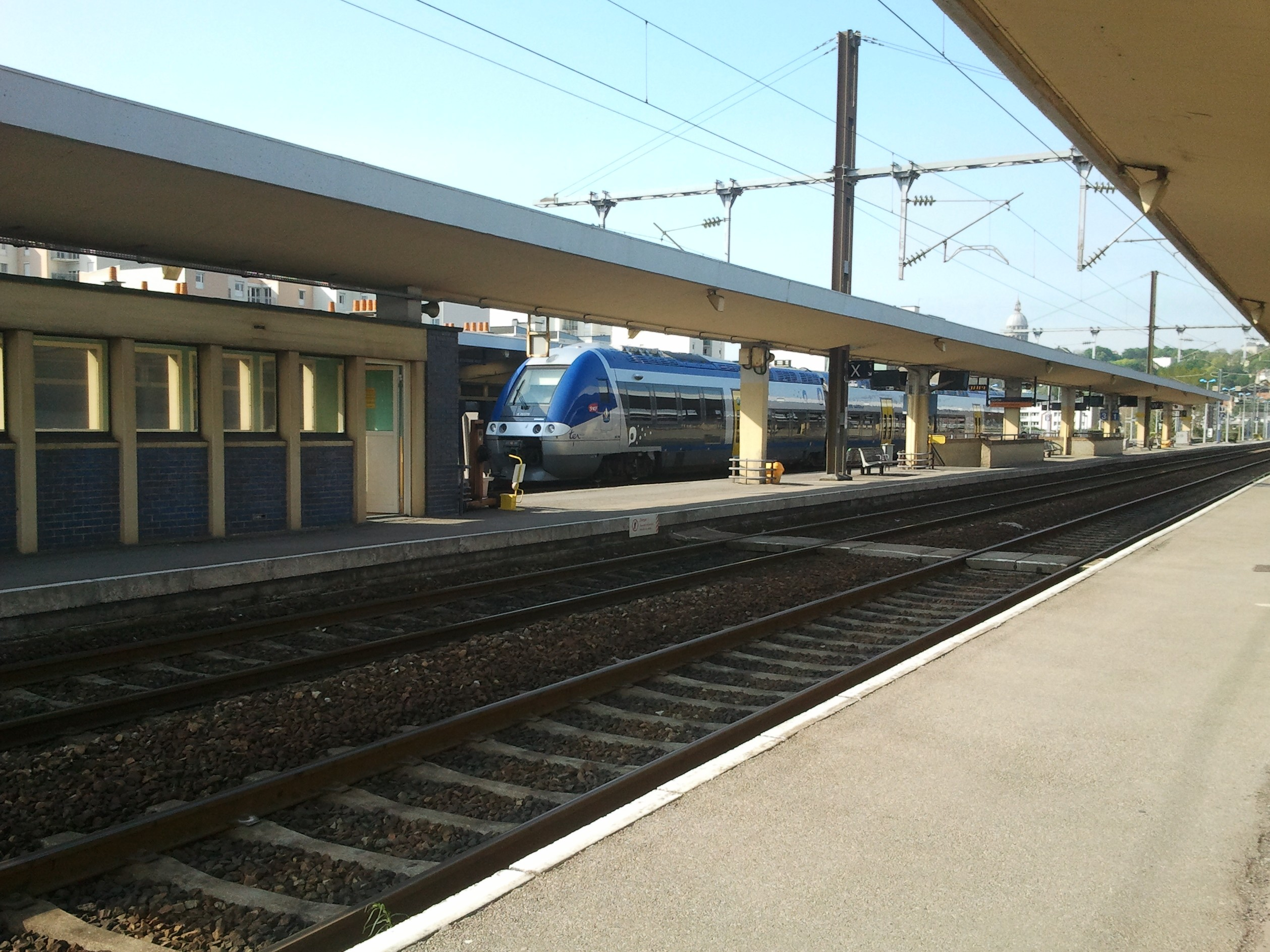 Intérieur de la gare de Boulogne-Ville